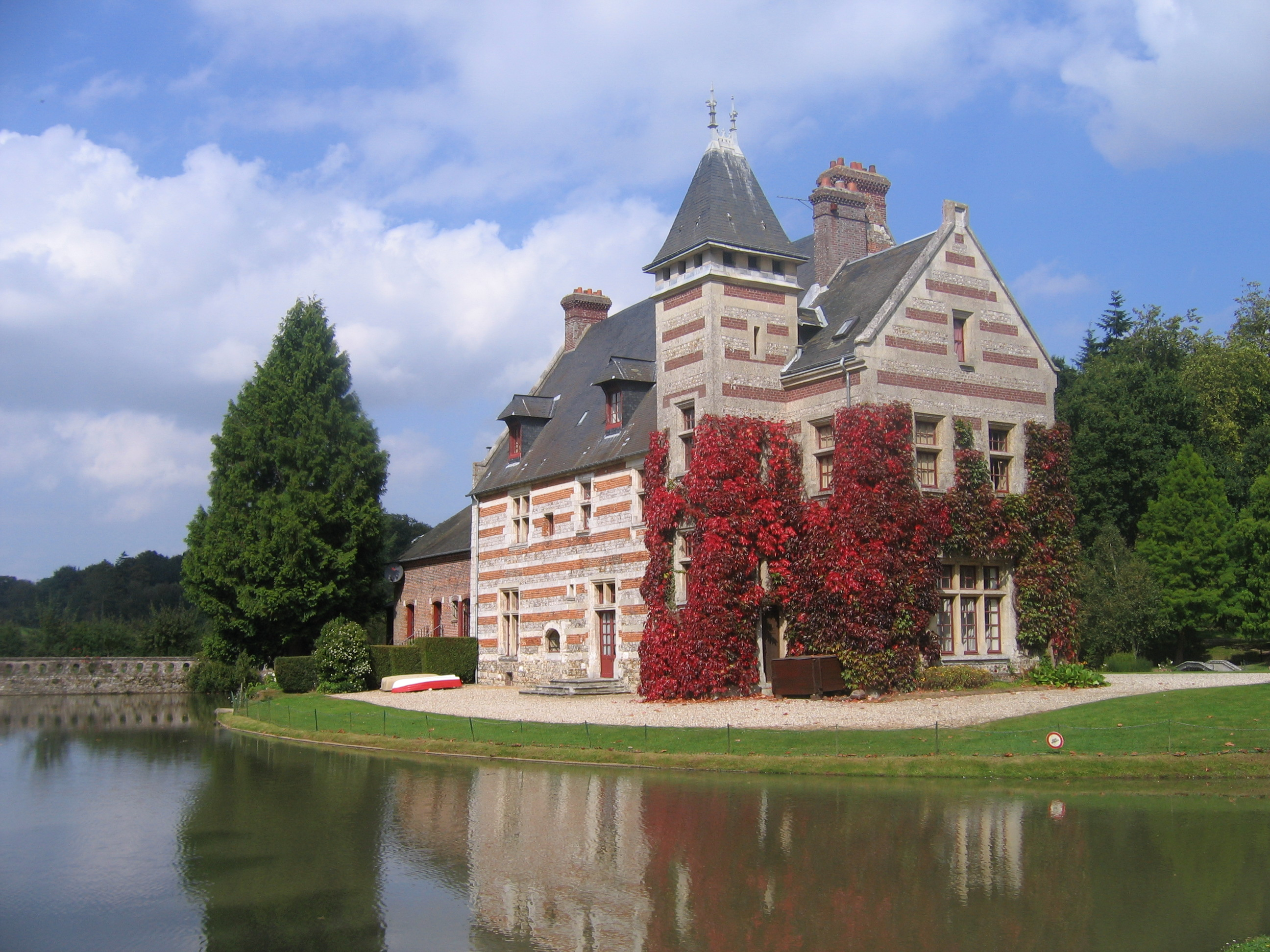 Château de Mirville, Seine-Maritime, Normandie, France